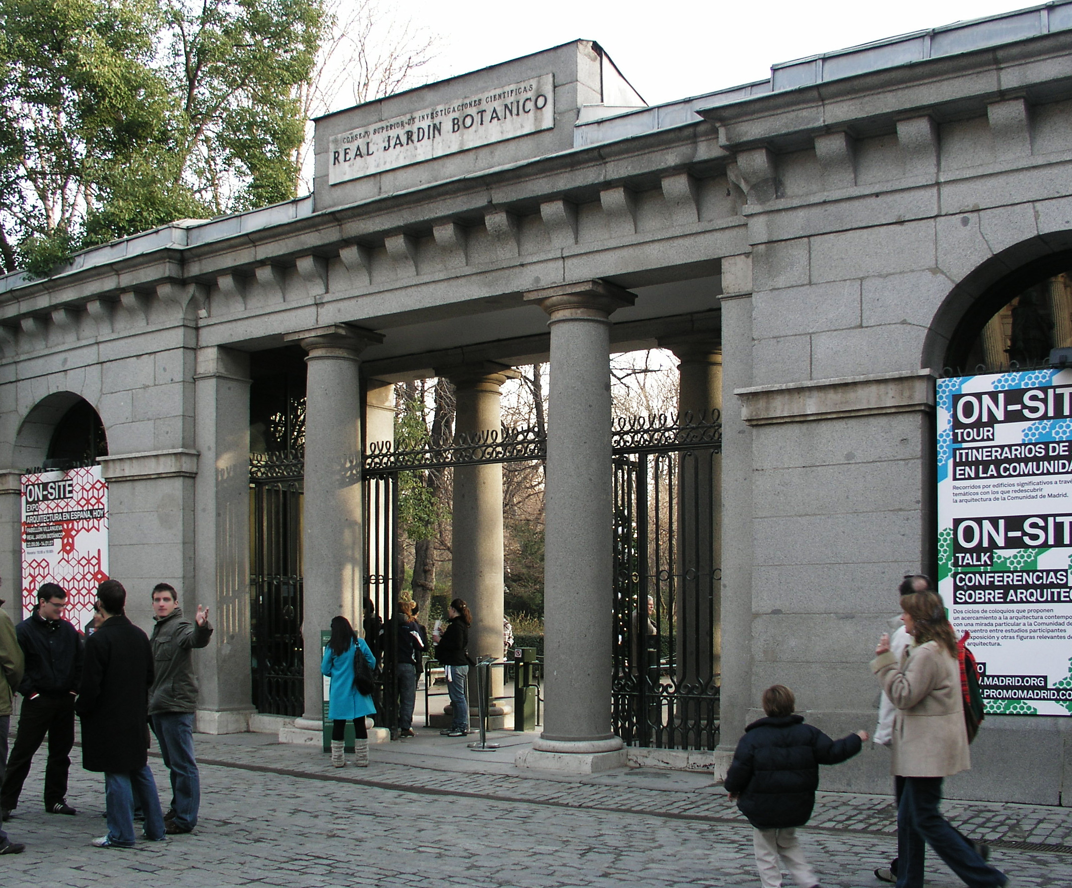 Royal Botanical Garden, Madrid, Spain. Puerta de Murillo.